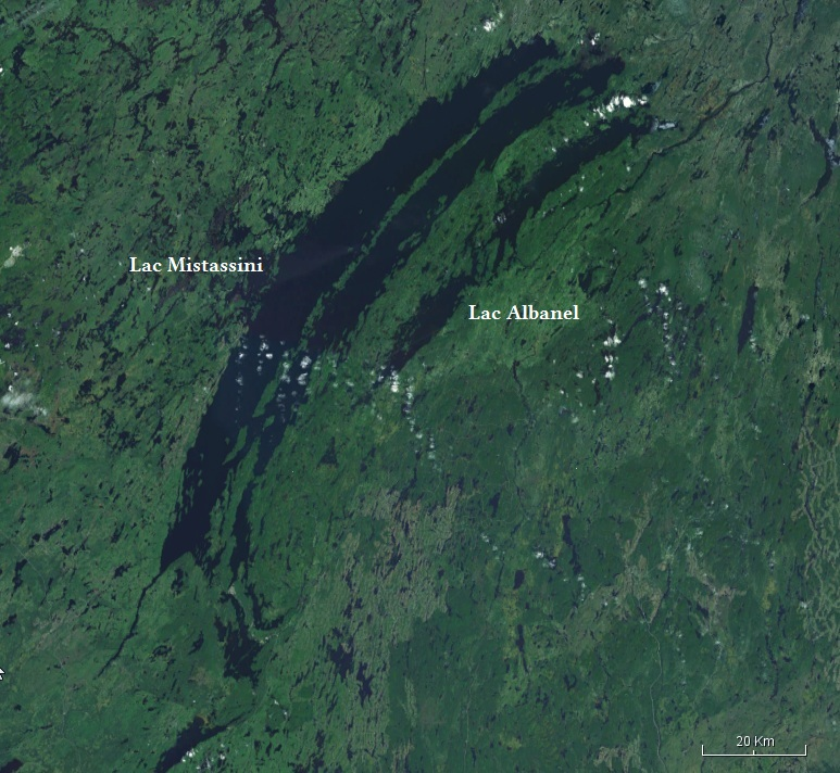 Lac Mistassini et Albanel, Québec